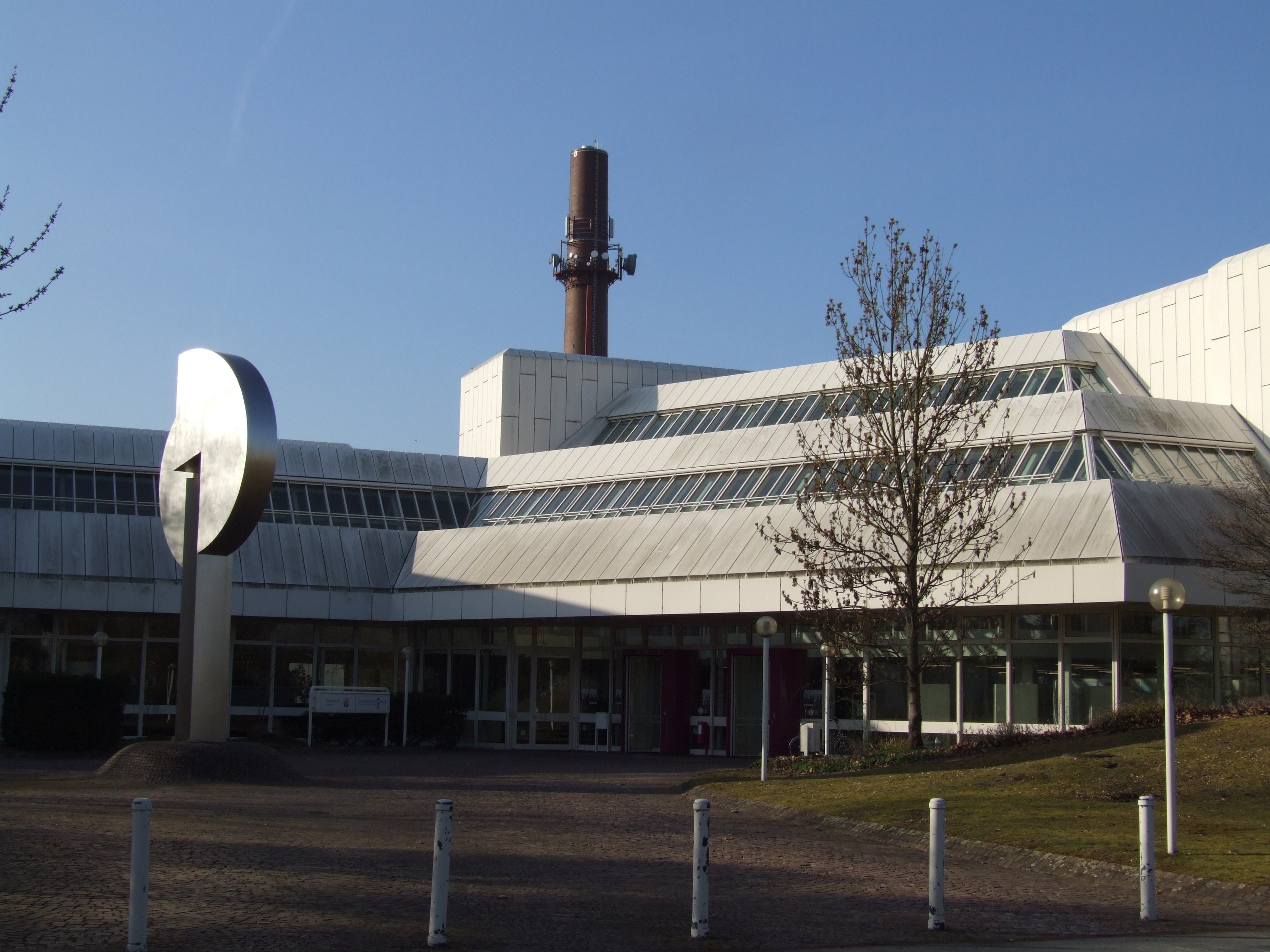 Universität Speyer, Freiherr-vom-Stein-Str. 2